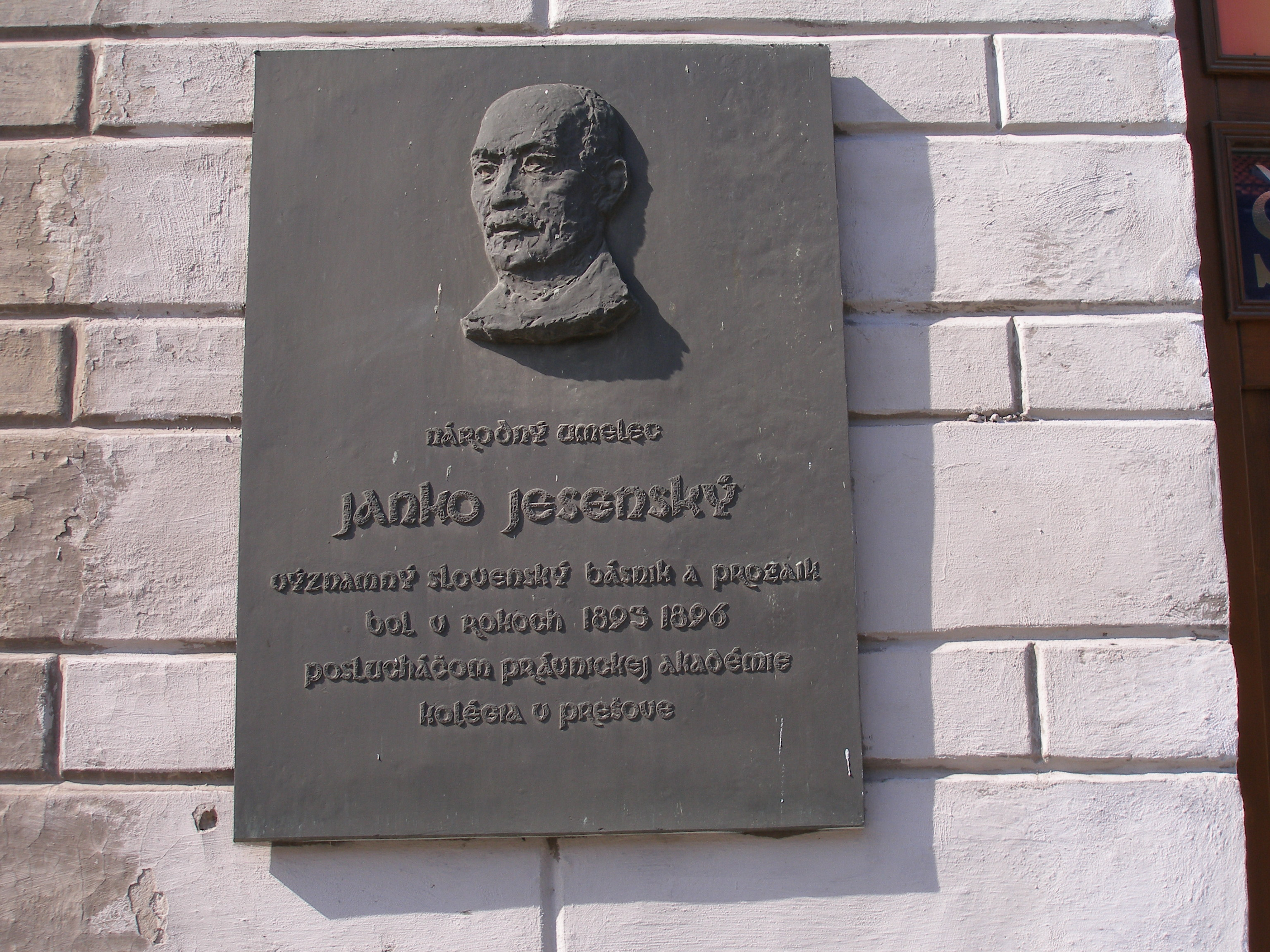 Prešov pamätná doska na budove Kolégia